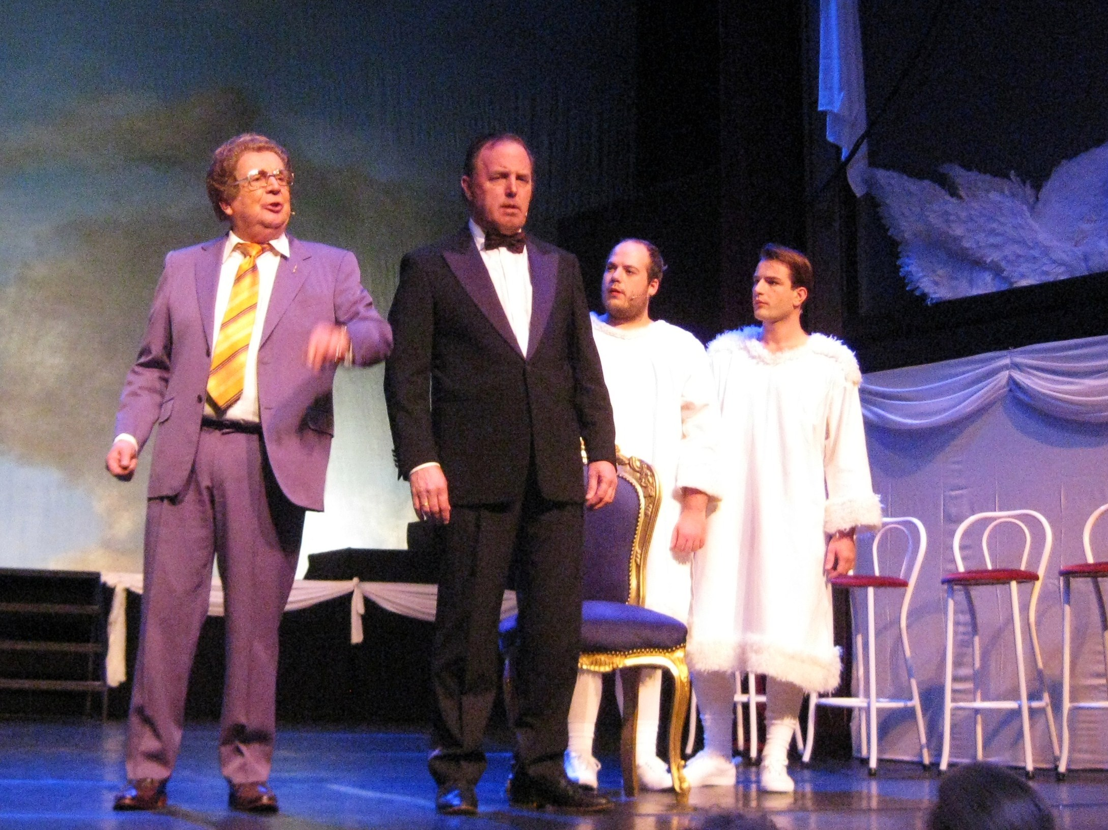 Rob van de Meeberg (links) als Johnny Jordaan en Bob Fosko (midden) als Willy Alberti in Kerstfeest in de Jordaan in Theater Het Zonnehuis in Amsterdam. December 2016